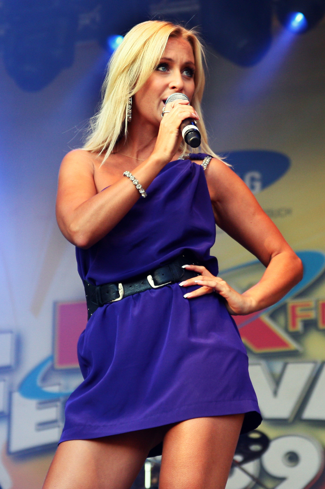 Rix FM Festival 2009, Kalmar, Sweden.